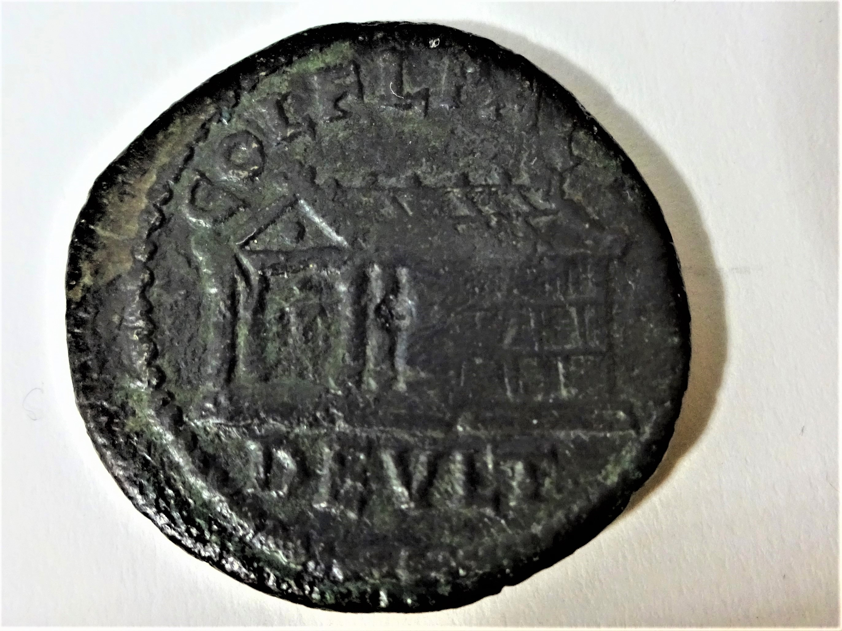 Aphroditetempel aus Deultum in Thrakia auf Bronzemünze z.Zt. Gordianus III.